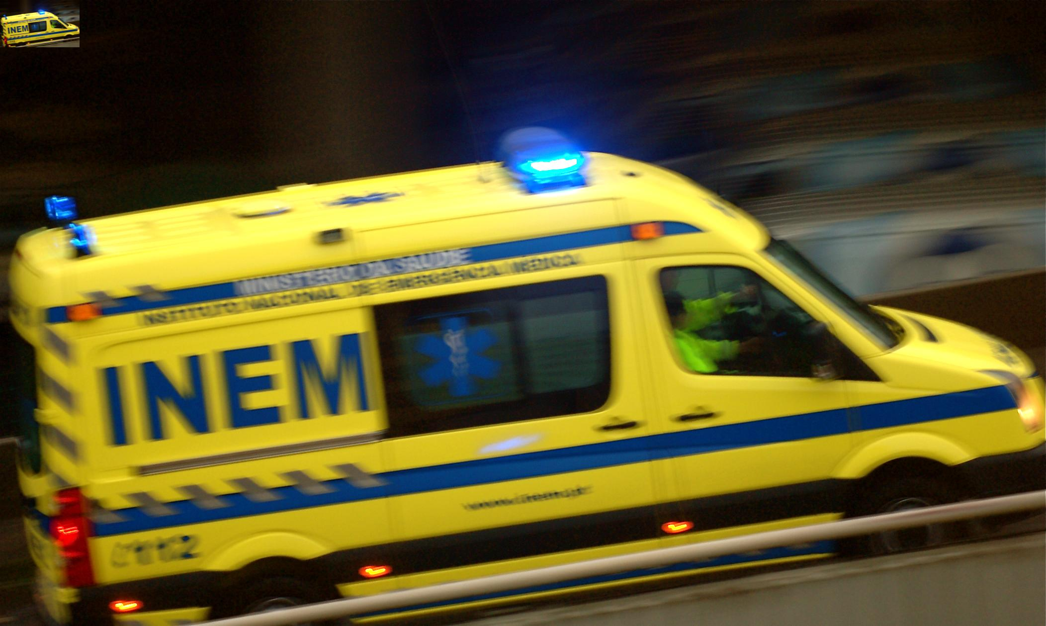 Lisbon, Portugal.